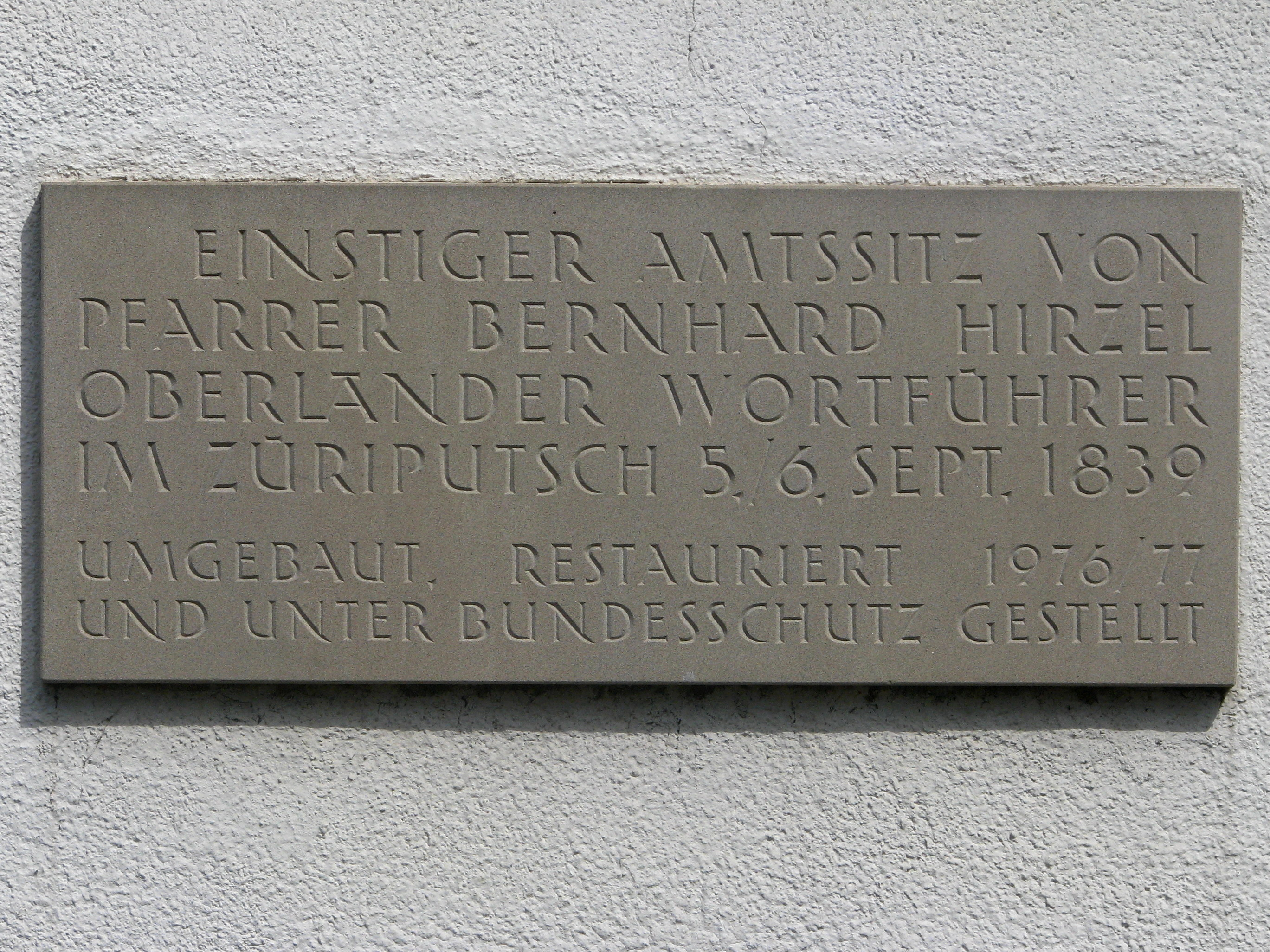 Pfäffikon (ZH) : Pfarrhaus, einstiger Amtssitz von Pfarrer Bernhard Hirzel, Oberländer Wortführer im Züriputsch 5./6. September 1839. Umgebaut, restauriert 1976/77 und unter Bundesschutz gestellt.